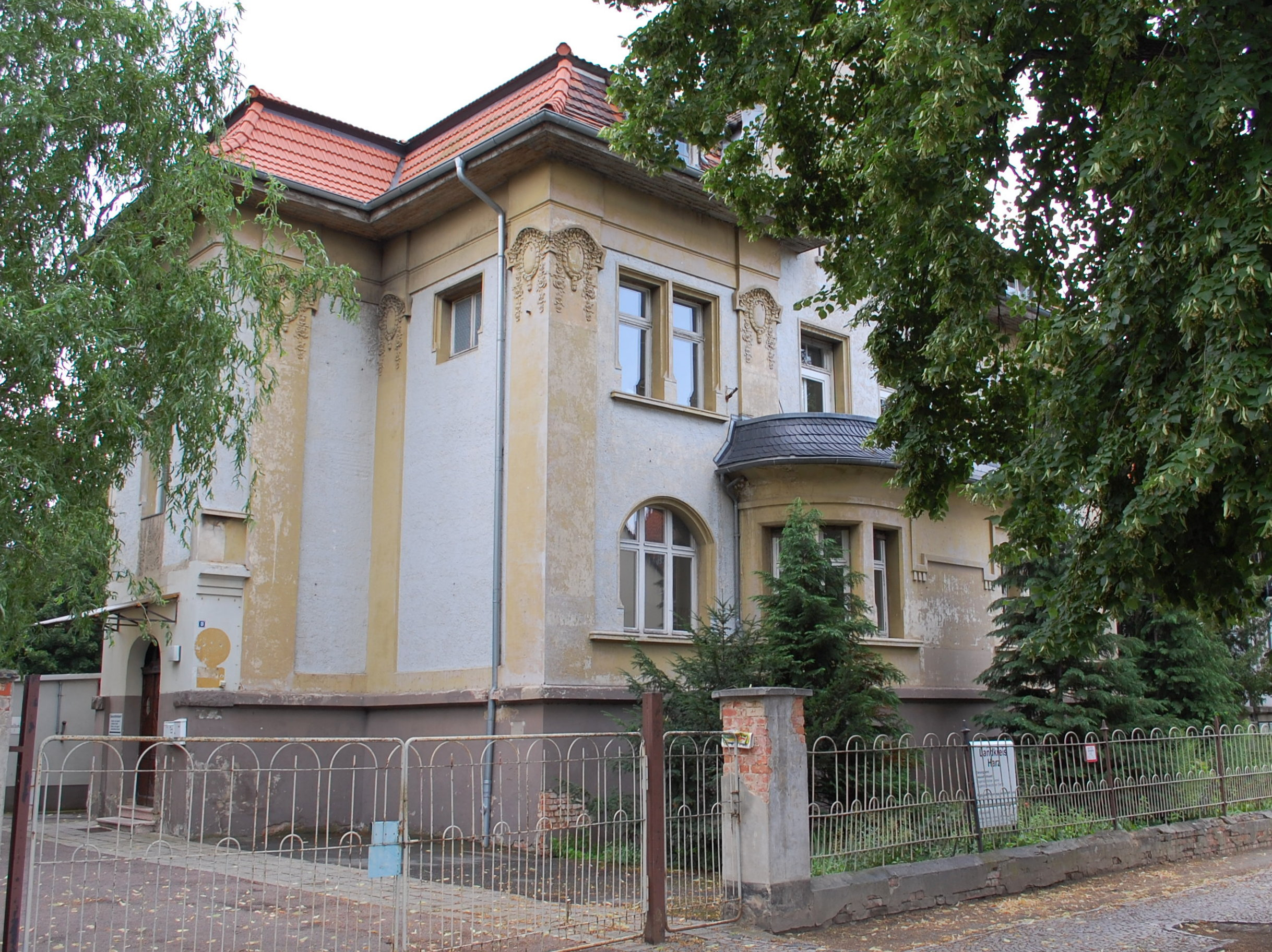 Wohnhaus Am Schiffbleek 3 in Quedlinburg; unter Denkmalschutz